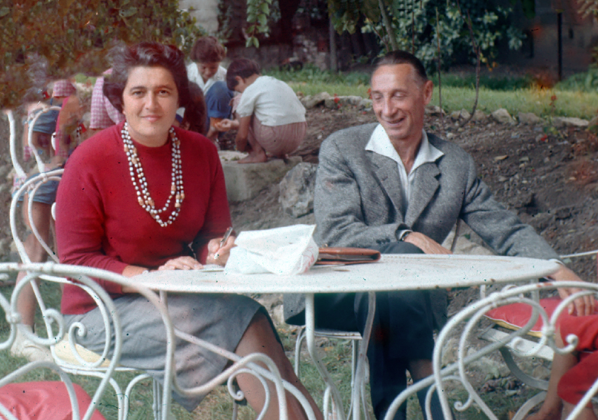 1960 Grisha Lewin Réalisateur et monteur de film avec sa femme Paulette photo prise a Pontgivart dans la marne.